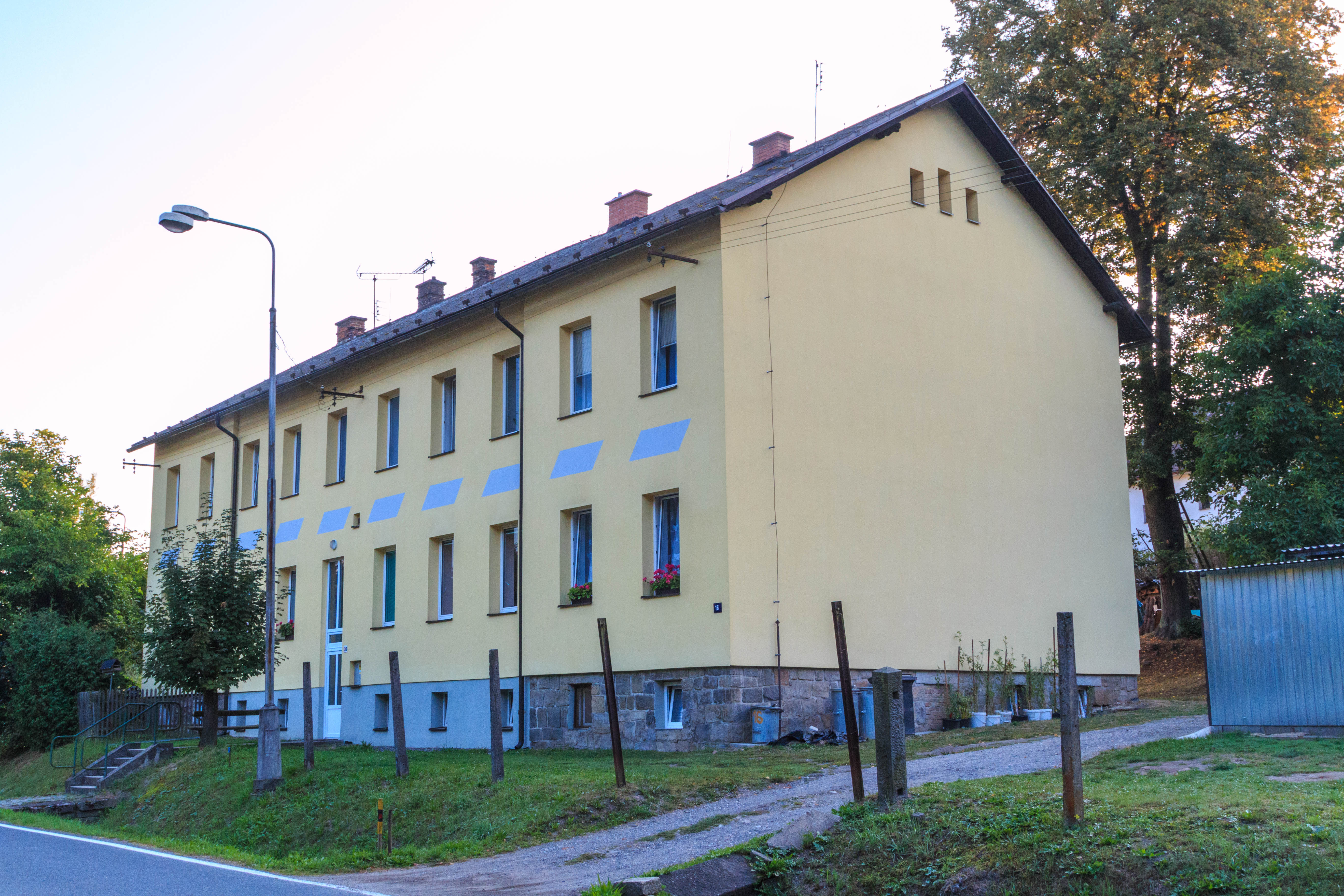 Josefodol - čp. 16